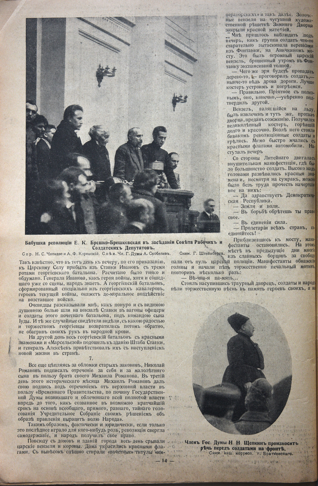 Это скан четырнадцатой страницы журнала Солнце России № 9 (367) за апрель 1917 года. На странице есть фотография Брешко-Брешковской, Керенского и Чхеидзе выстпающих на Съезде Рабочих и солдатских депутатов